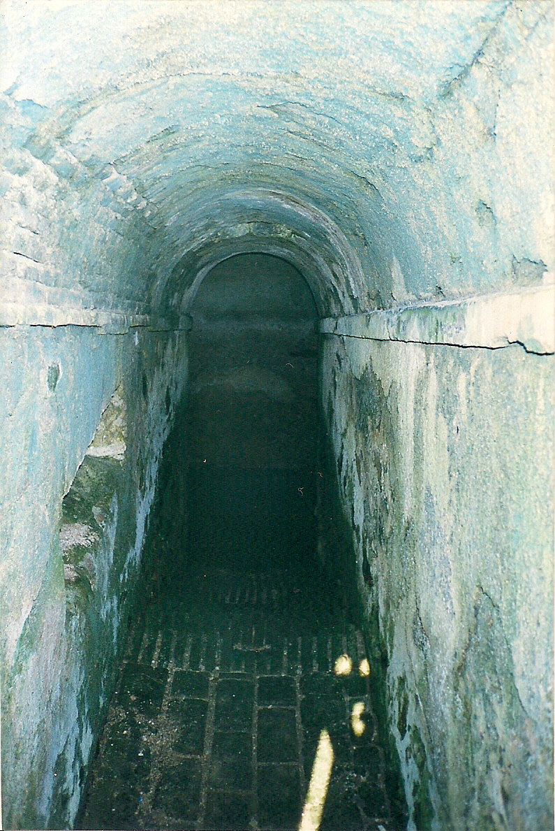 Fortaleza de Santo Antônio de Ratones, ilha de Ratones Grande, SC, Brasil: corredor da Cisterna.